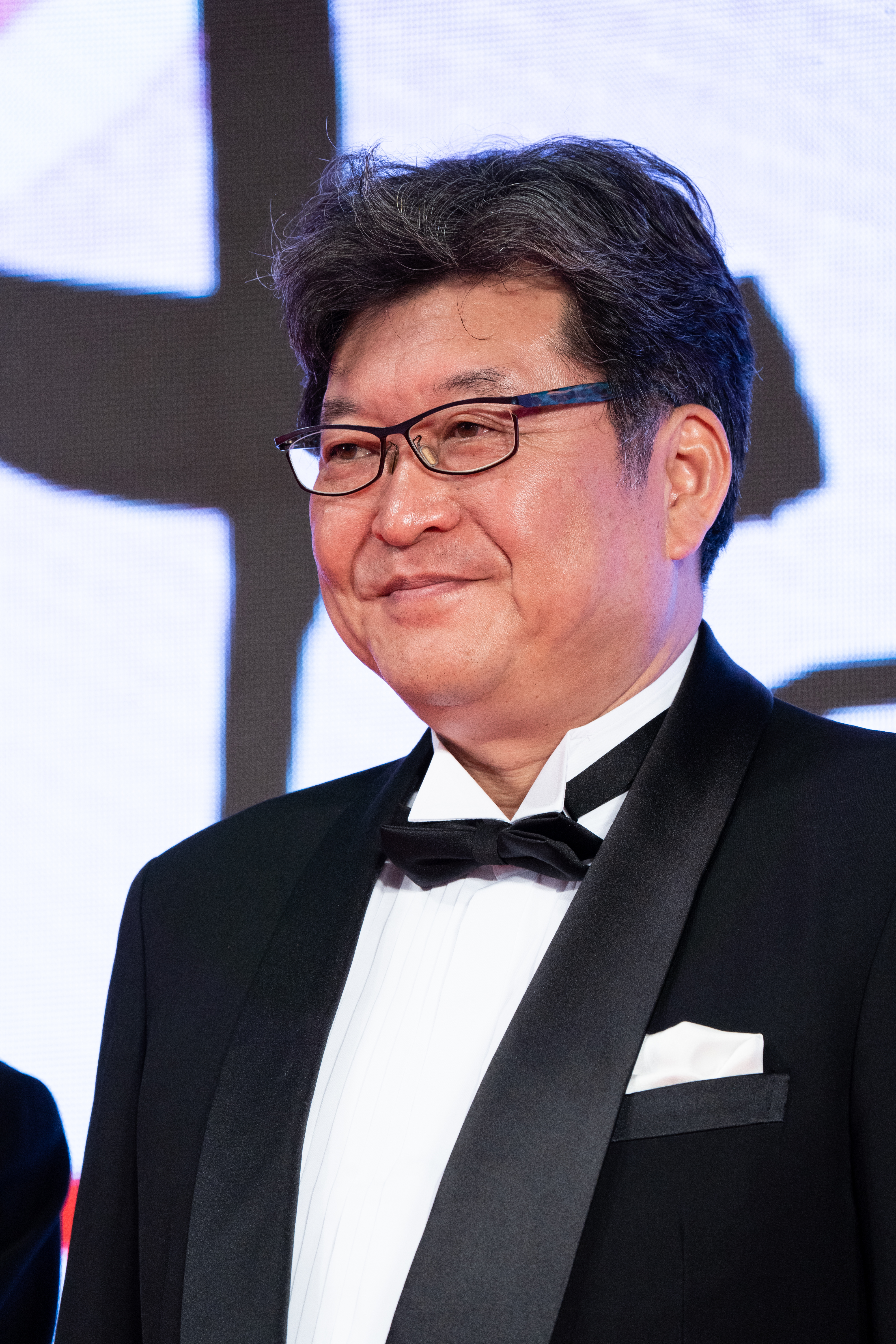 第32回 東京国際映画祭 オープニングセレモニー 萩生田光一